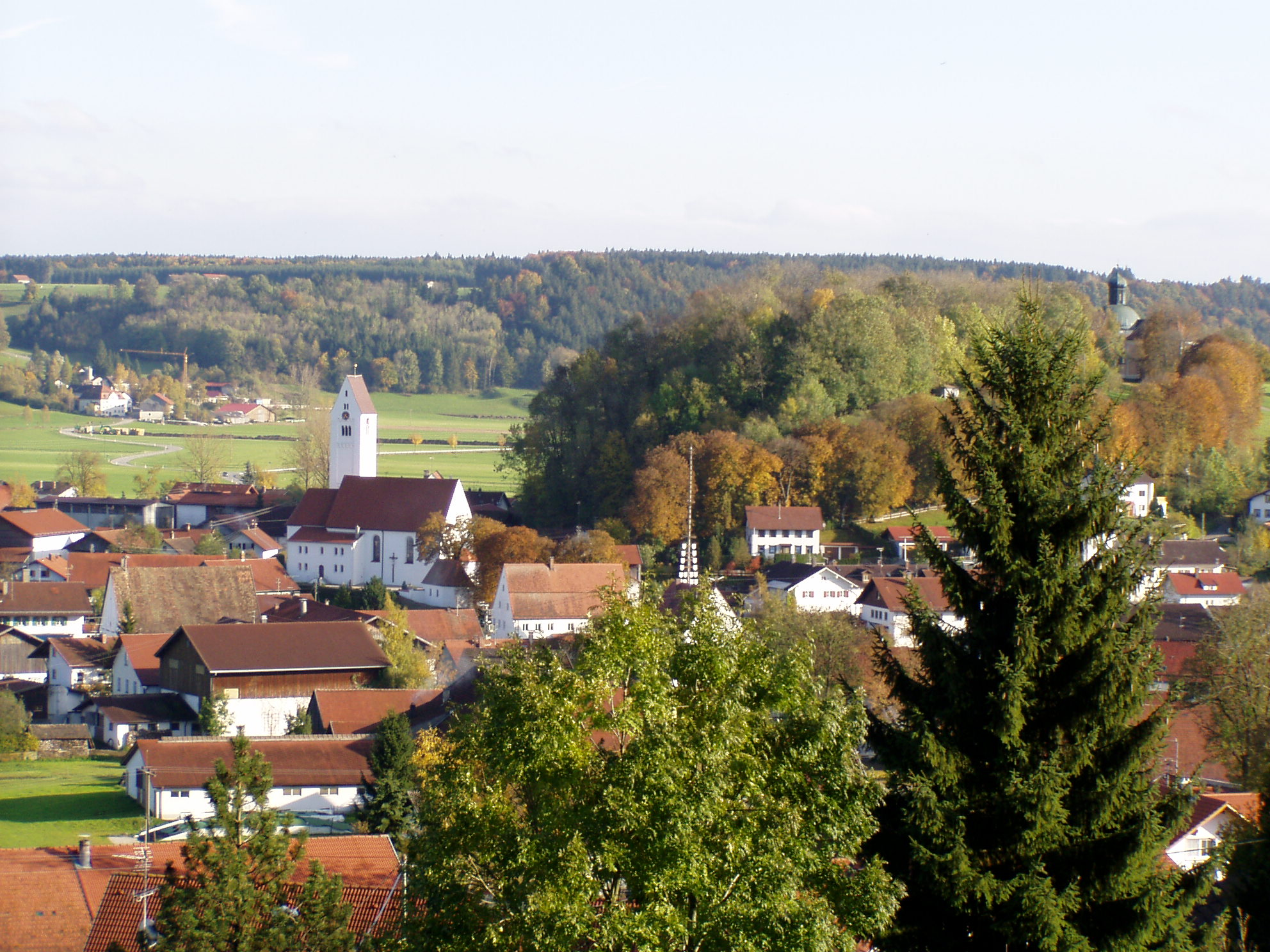 Eggenthal von Westen